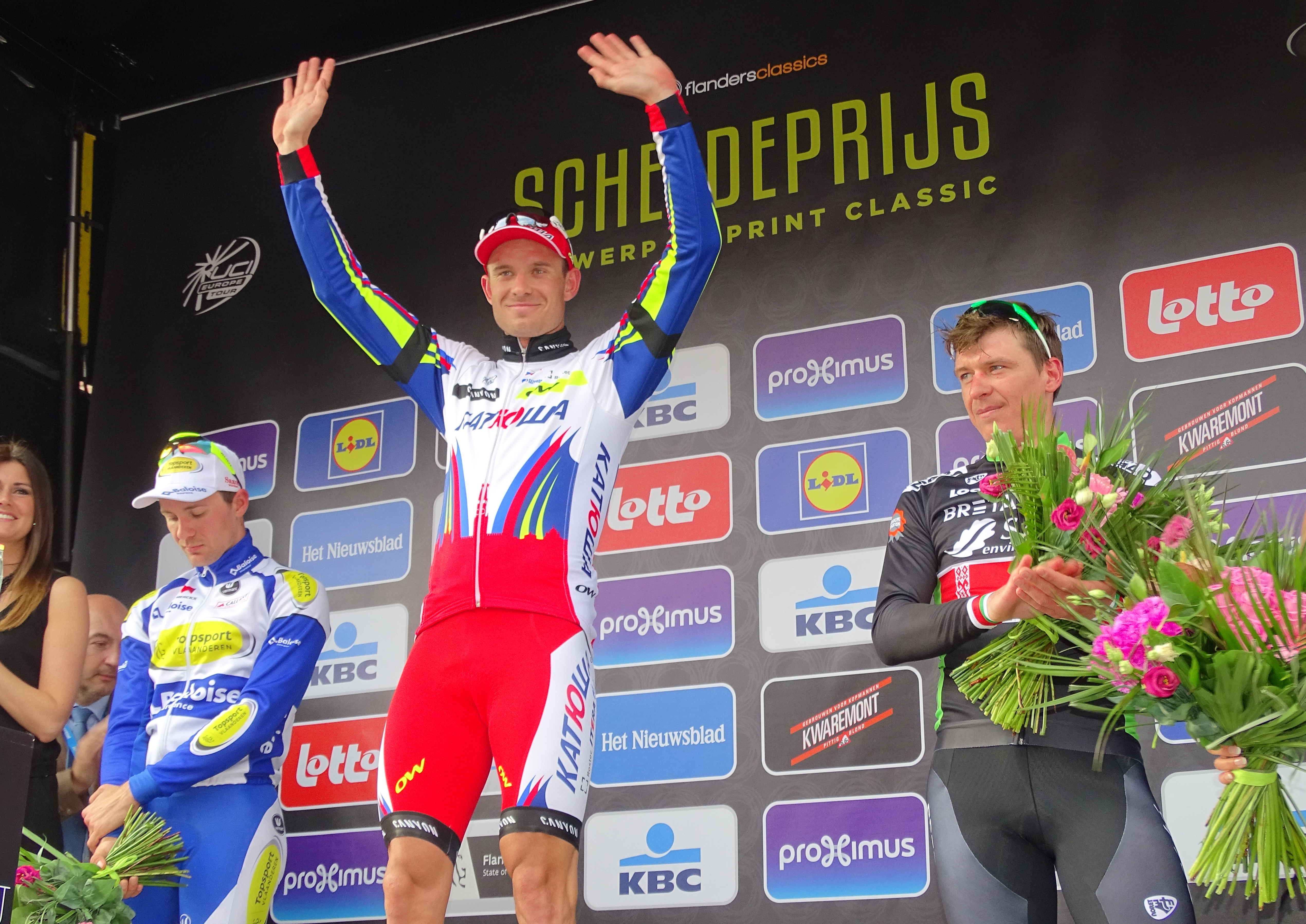 Reportage réalisé le mercredi 8 avril à l'occasion de l'arrivée du Grand Prix de l'Escaut 2015 à Schoten, Belgique.